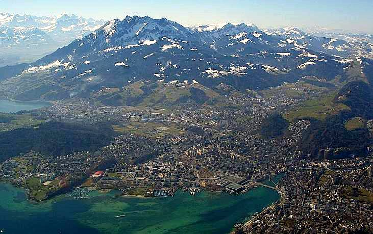 Flugaufnahme der Stadt Luzern mit dem Pilatus